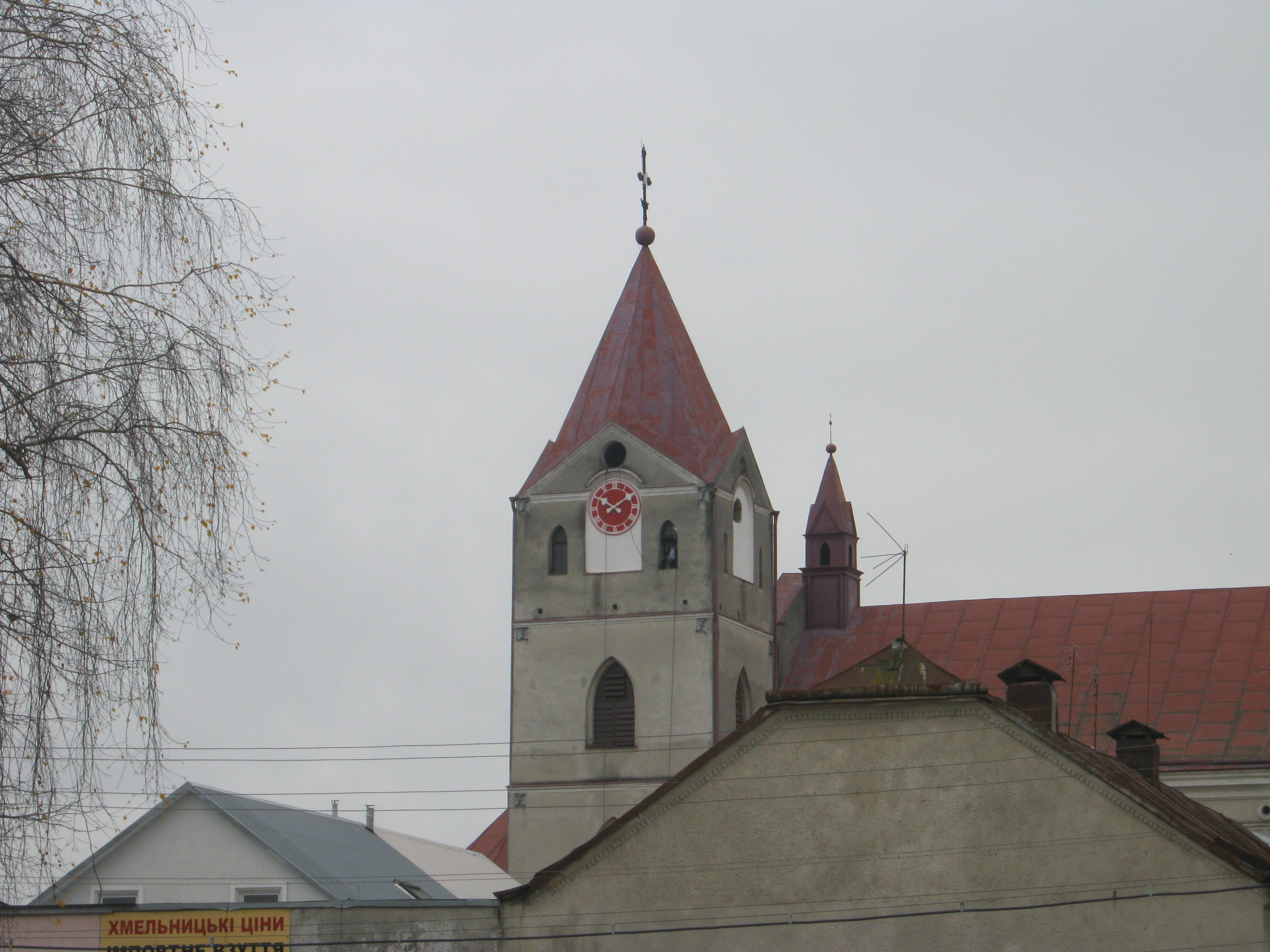 Санктуарій Матері Божої Неустанної Помочі